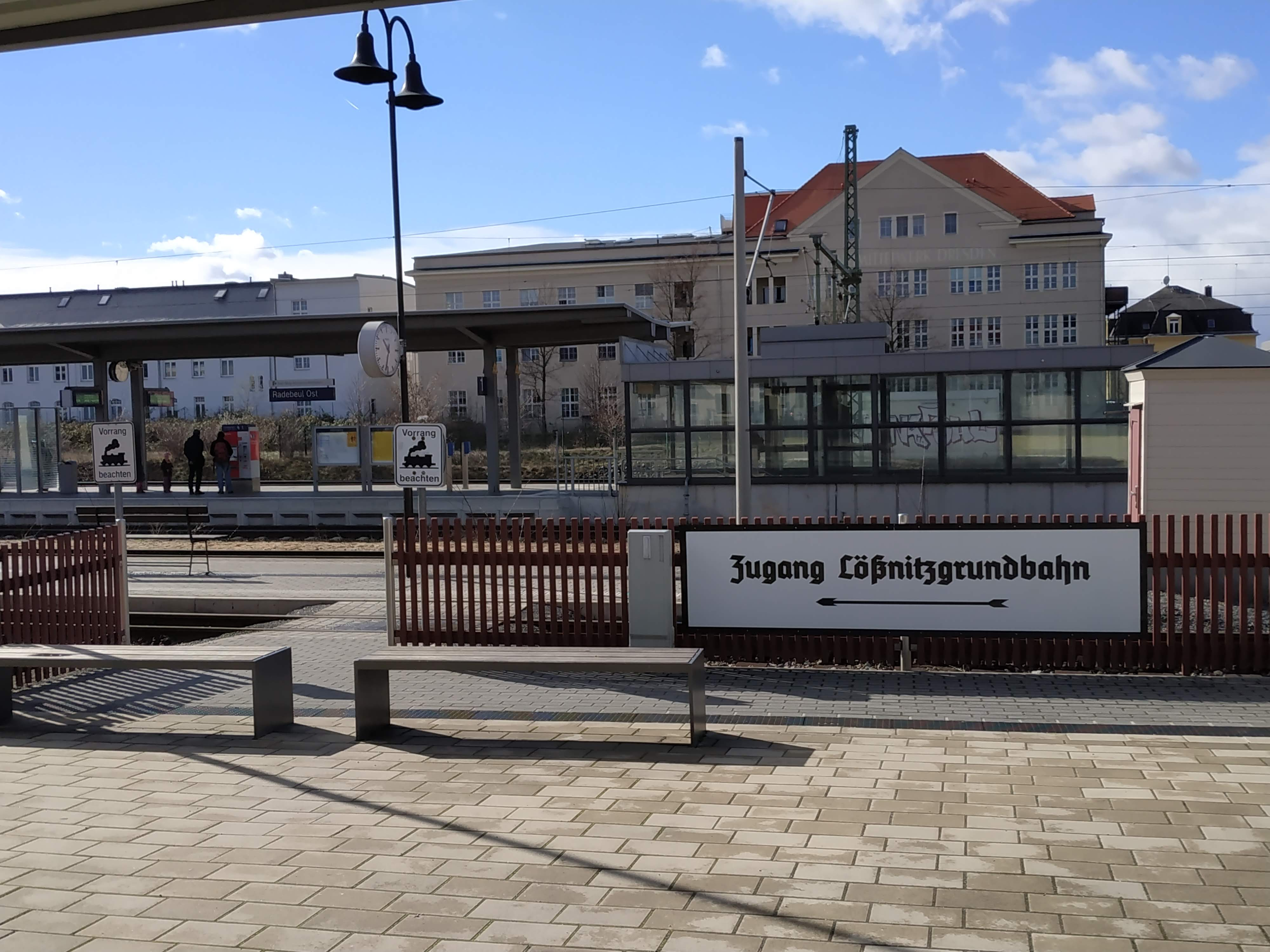 Lößnitzgrundbahn et vues des quais S-Bahn en gare de Radebeul-Ost